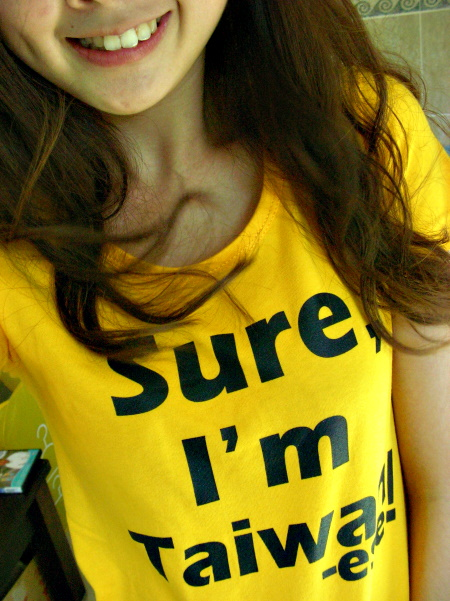 標準的棉質T-shirt